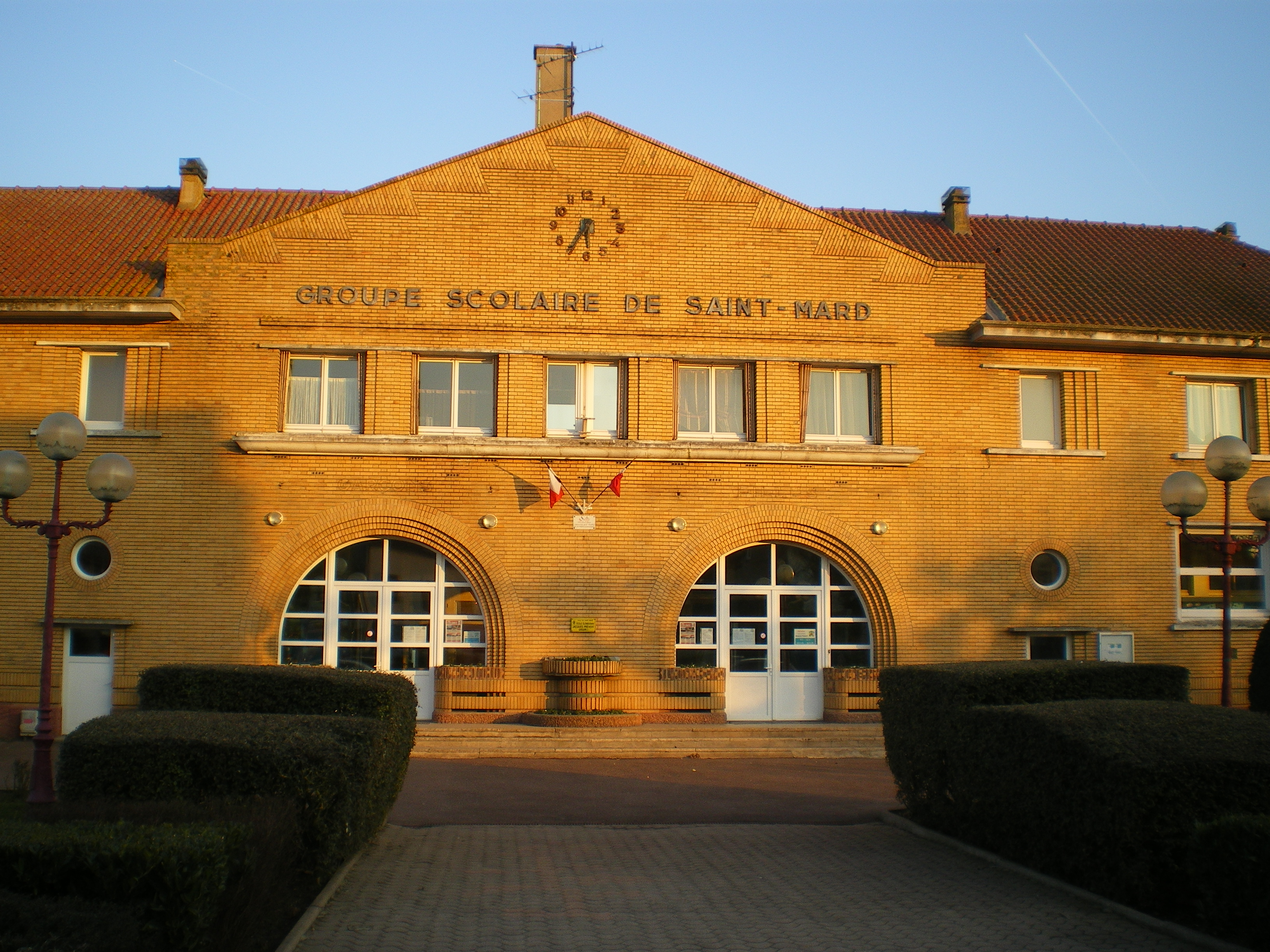 groupe scolaire de Saint-Mard - École Primaire Jacques Prévert